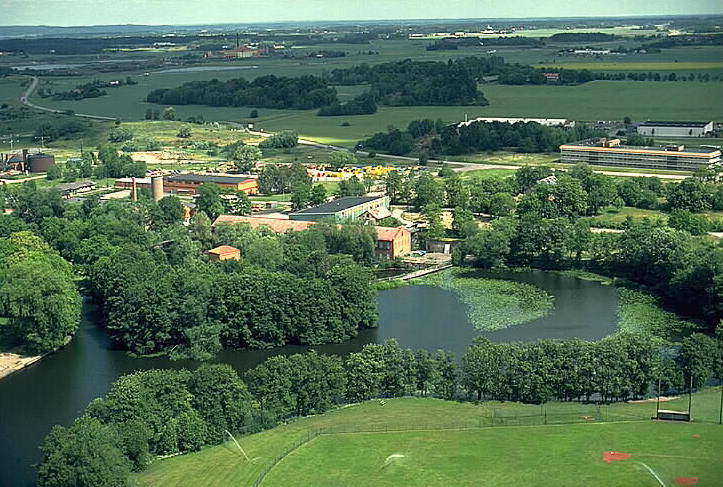 Motiv: Gumpekulla Nyckelord: Flygbilder, Riksintressen Kategori: IndustrimiljöGumpekulla